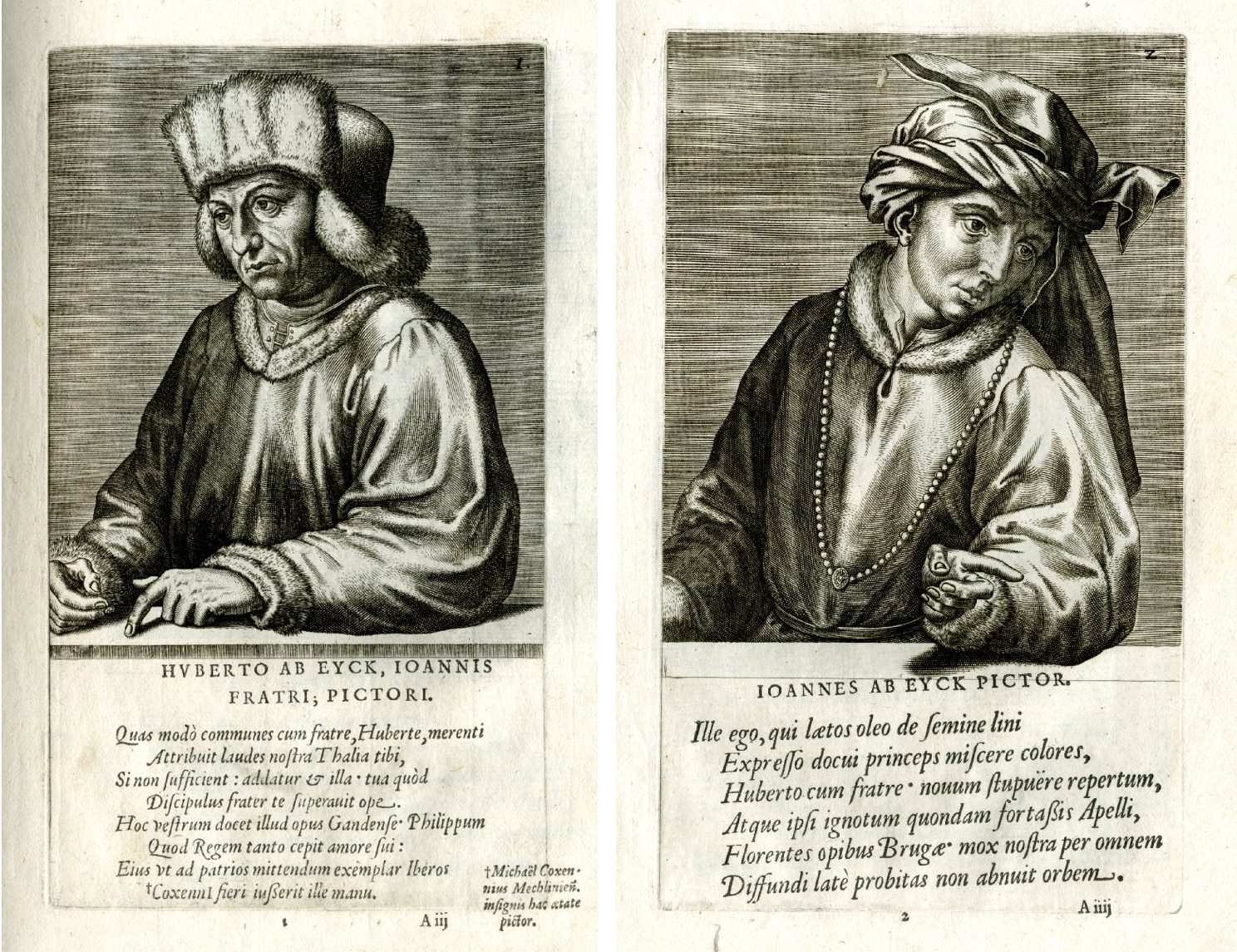 Porträts von Hubert und Jan van Eyck nach dem Genter Altar (linker Flügel, Gerechte Richter) in: Pictorum Aliquot Celebrium Germaniae Inferioris Effigies, Erstdruck 1572 durch Volcxken Diericx.